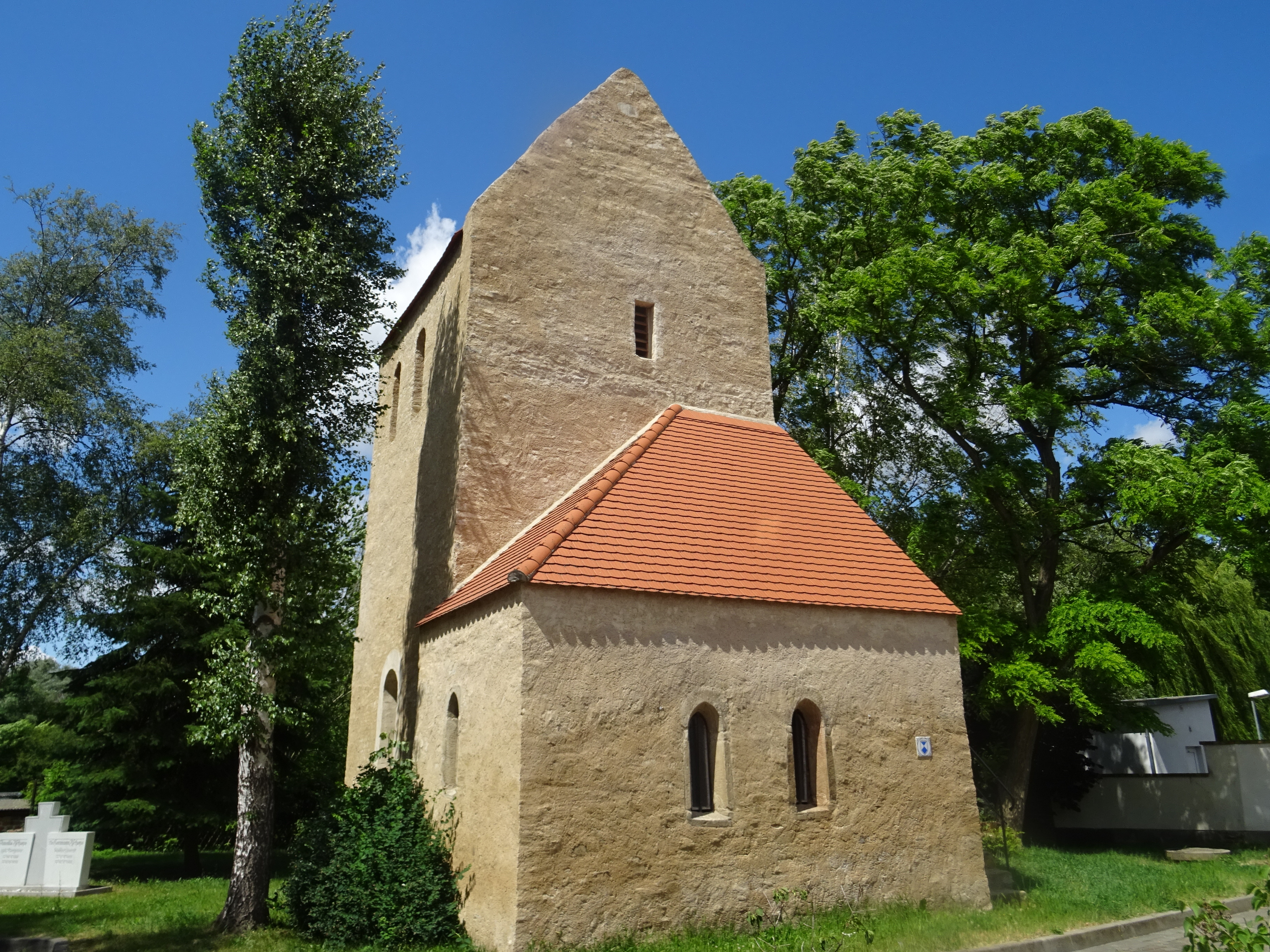 Biendorf, Alter Turm, Rest ein romanischen Kirche (das Schiff in den 1840er Jahren zerstört), Blick von Südosten